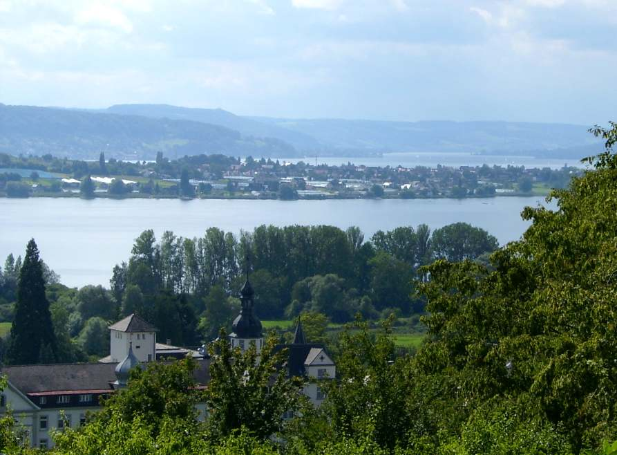 Blick auf die Insel Reichenau oberhalb von Hegne; am Ufer im Vordergrund Teile des Naturschutzgebiets „Bodenseeufer (Gmk. Allensbach, Hegne, Reichenau)“